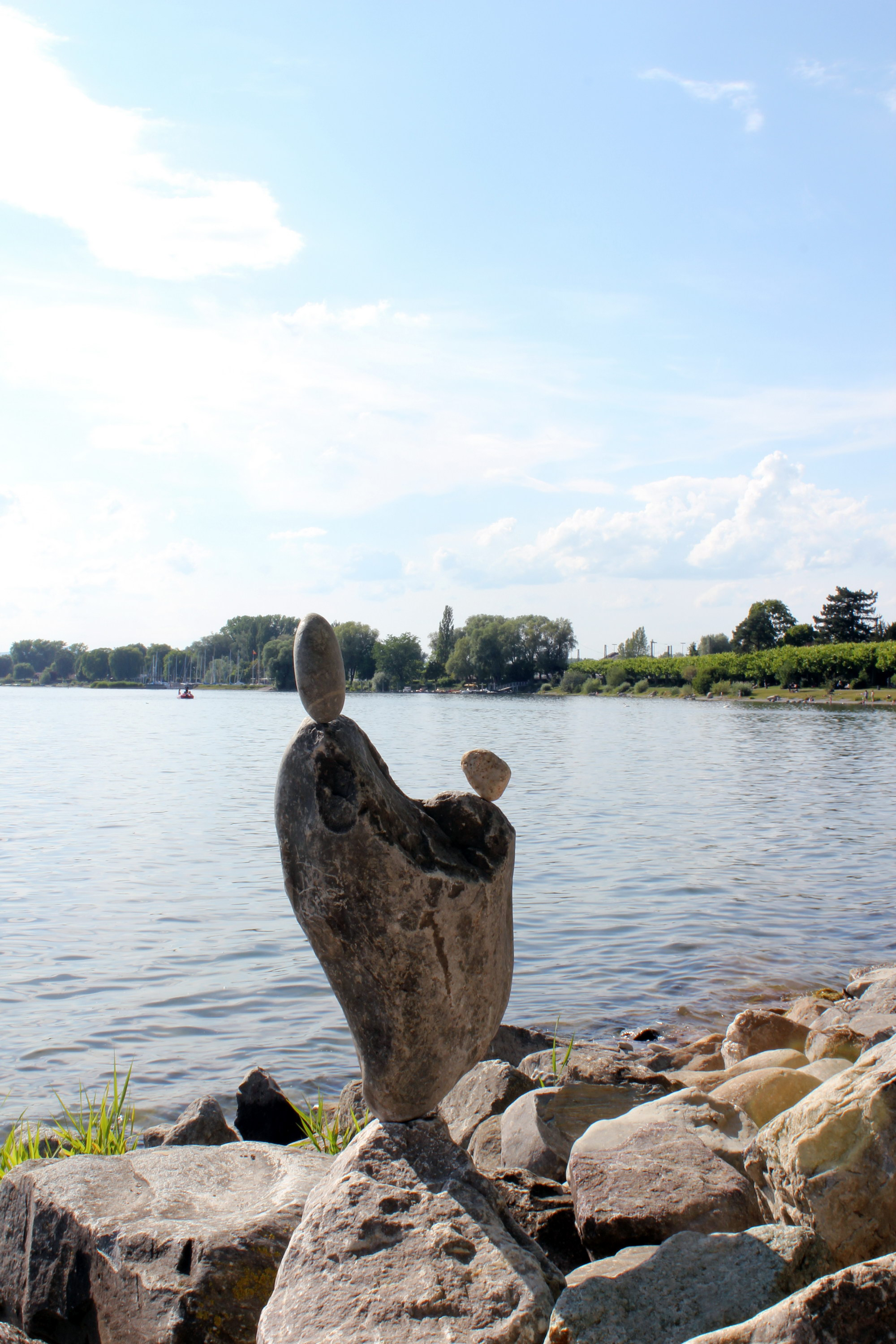 Steinkunst von Josef „Sepp“ Bögle, Radolfzell, Juni 2011